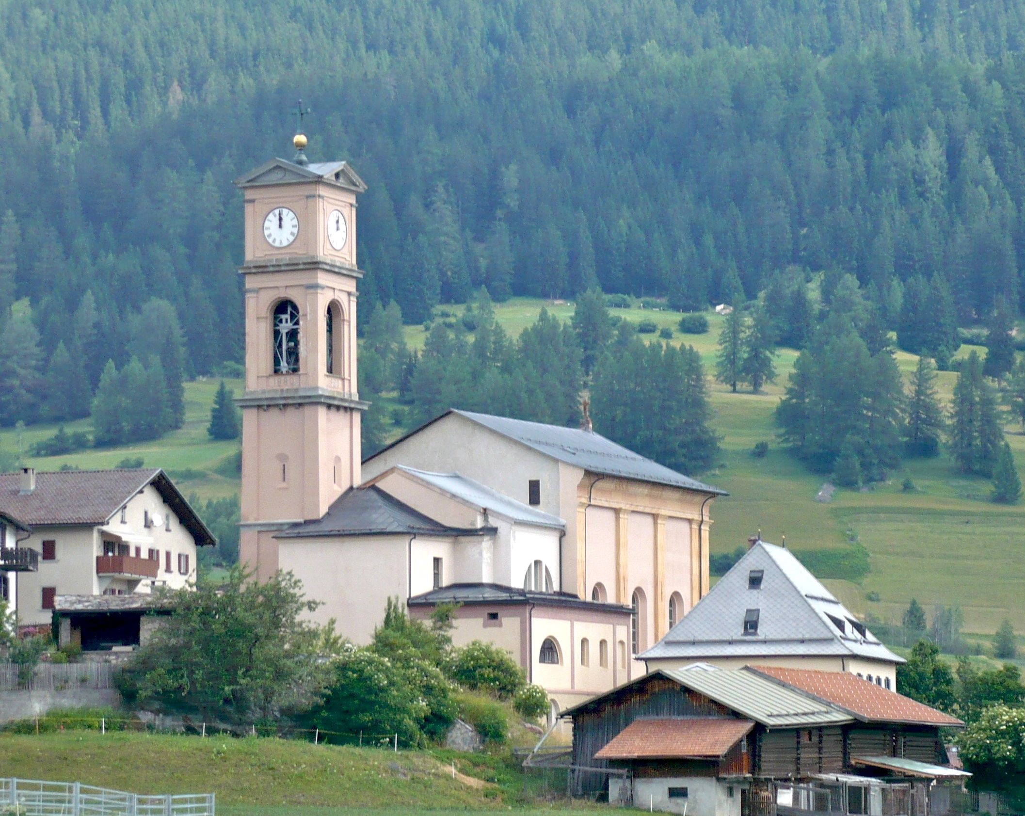 Antoniuskirche Lantsch/Lenz Fassade